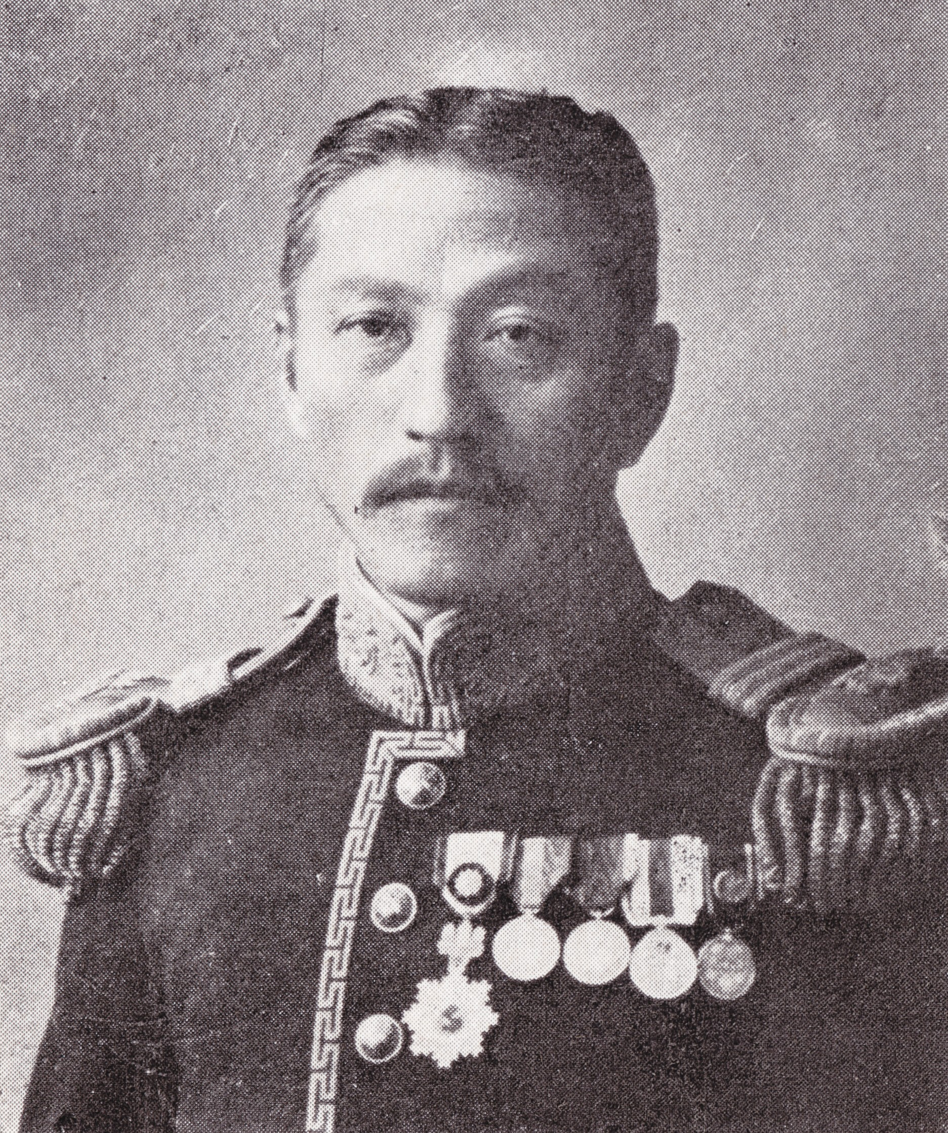 男爵西五辻文仲